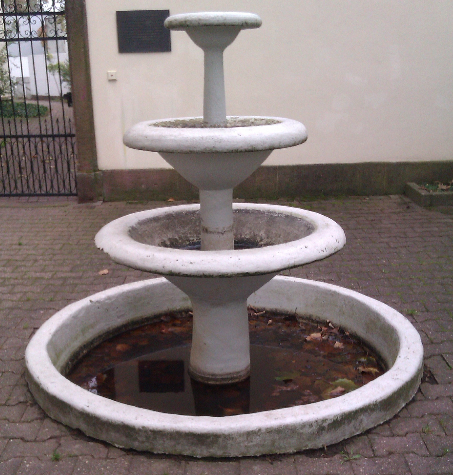 Brunnen an der Kirche